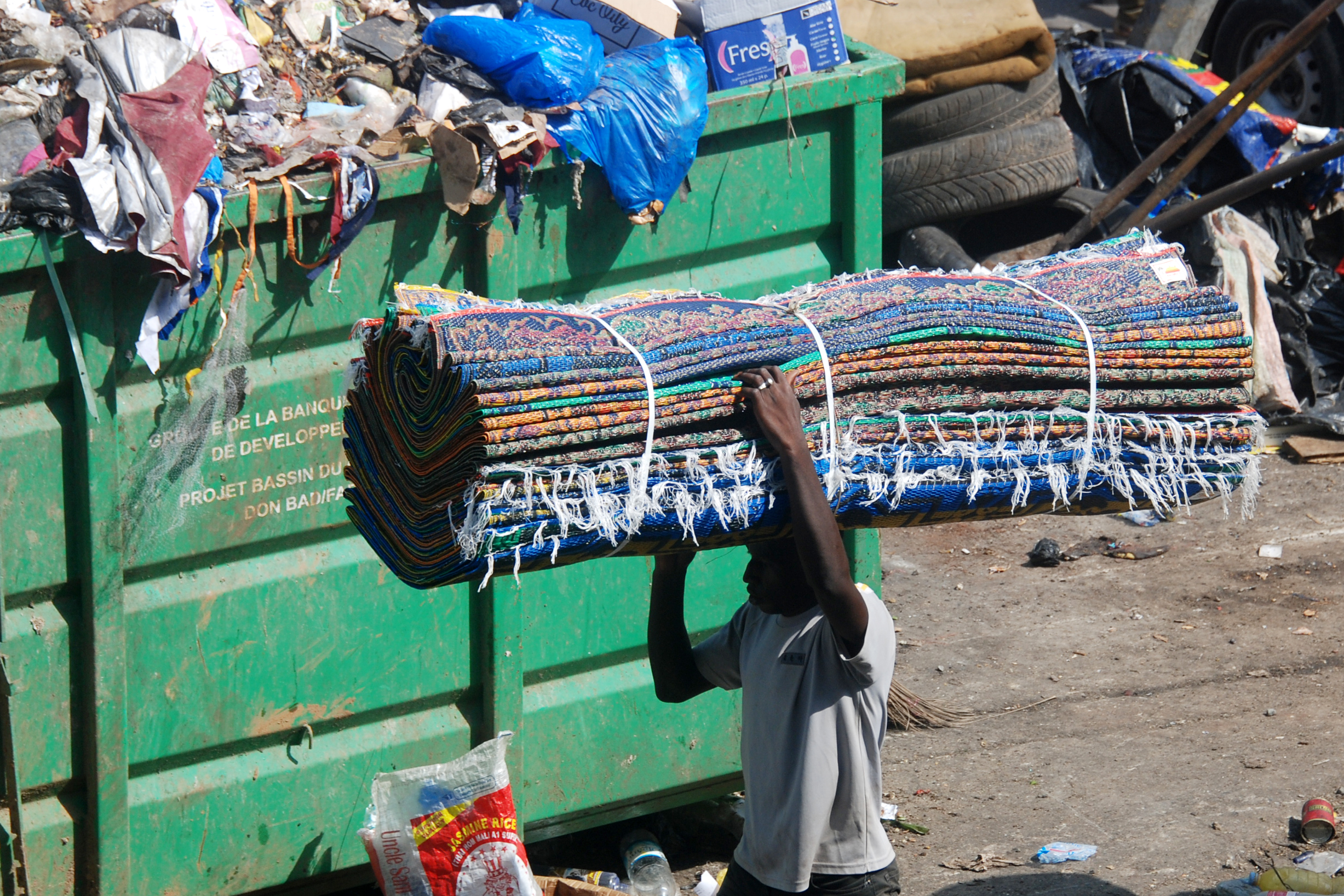 vendeur de nattes dans les rues d'Abidjan This is an image of "African people at work" from Ivory Coast